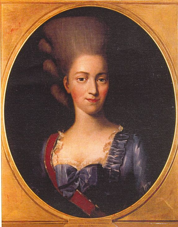 Baronne Henriette von Oberkirch (1754-1803), née Waldner von Freundstein. Henriette von Oberkirch (* 5. Juli 1754 in Schweighouse (dt.: Schweighausen) bei Thann im Elsass; † 10. Juni 1803 in Straßburg), besser bekannt als Baronne d'Oberkirch, war eine geborene Waldner von Freundstein. Ihre Eltern waren Freiherr, später Graf, Franz Ludwig Waldner von Freundstein (1710-1788), Herr zu Schmieheim, und dessen Frau Wilhelmine Auguste von Berckheim zu Rappoltsweiler. Nach ihrer Heirat mit Siegfried von Oberkirch 1773 und der Geburt des einzigen Kindes Marie Philippine begleitete sie ihre Freundin, Prinzessin Sophie Dorothee von Württemberg, die spätere russische Zarin Maria Fjodorowna, auf einer Reise durch Europa. Sie kam dabei auch an den Hof Ludwigs XVI. und Marie Antoinettes.